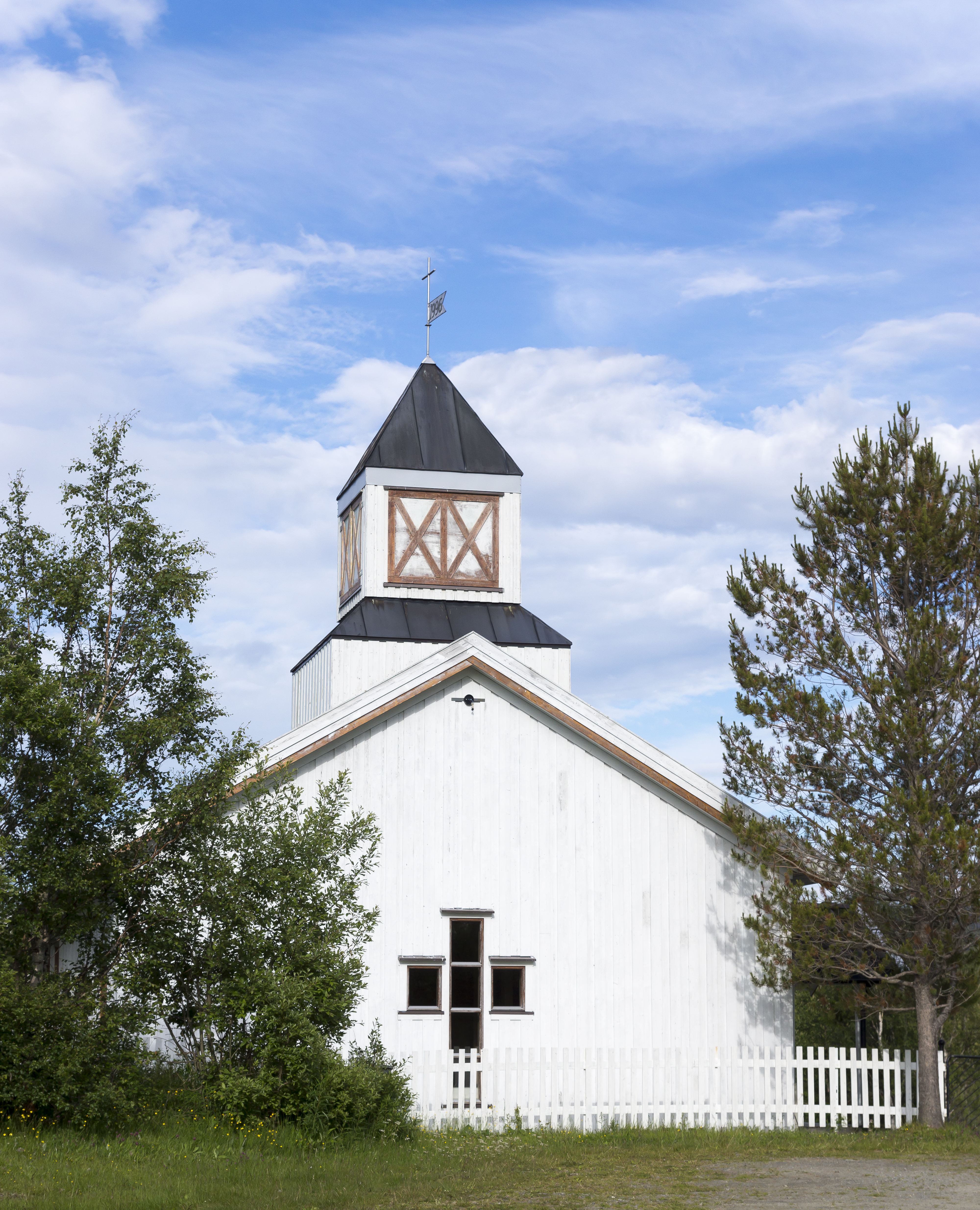 Sela fjellkirke